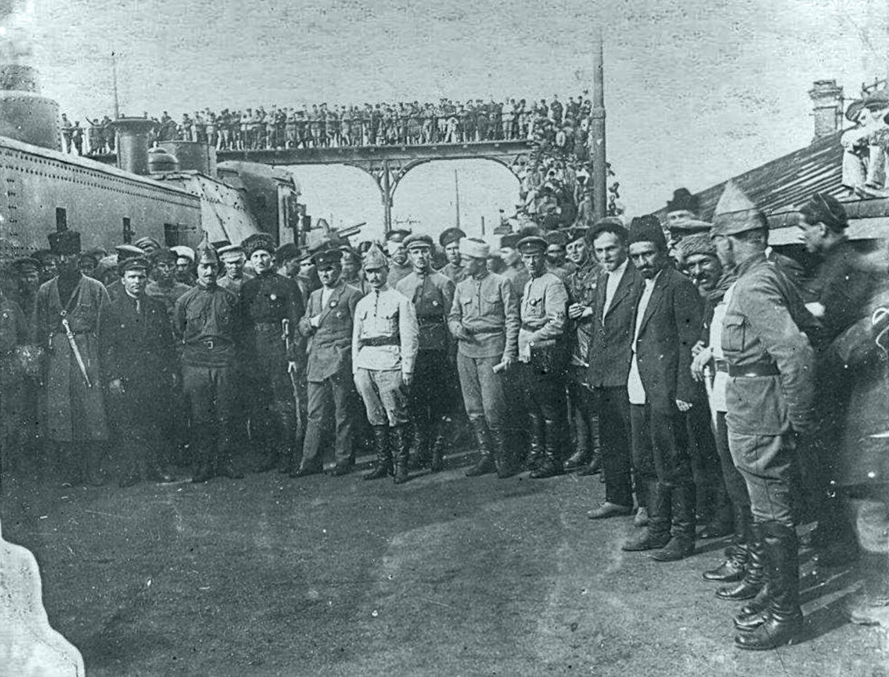 Kirow (x), Mikojan (xx), Ordschonikidse und Lewandowski bei Soldaten der Roten Armee und den Kommandeuren der 11. sowjetischen Armee auf dem Bahnhof von Baku.